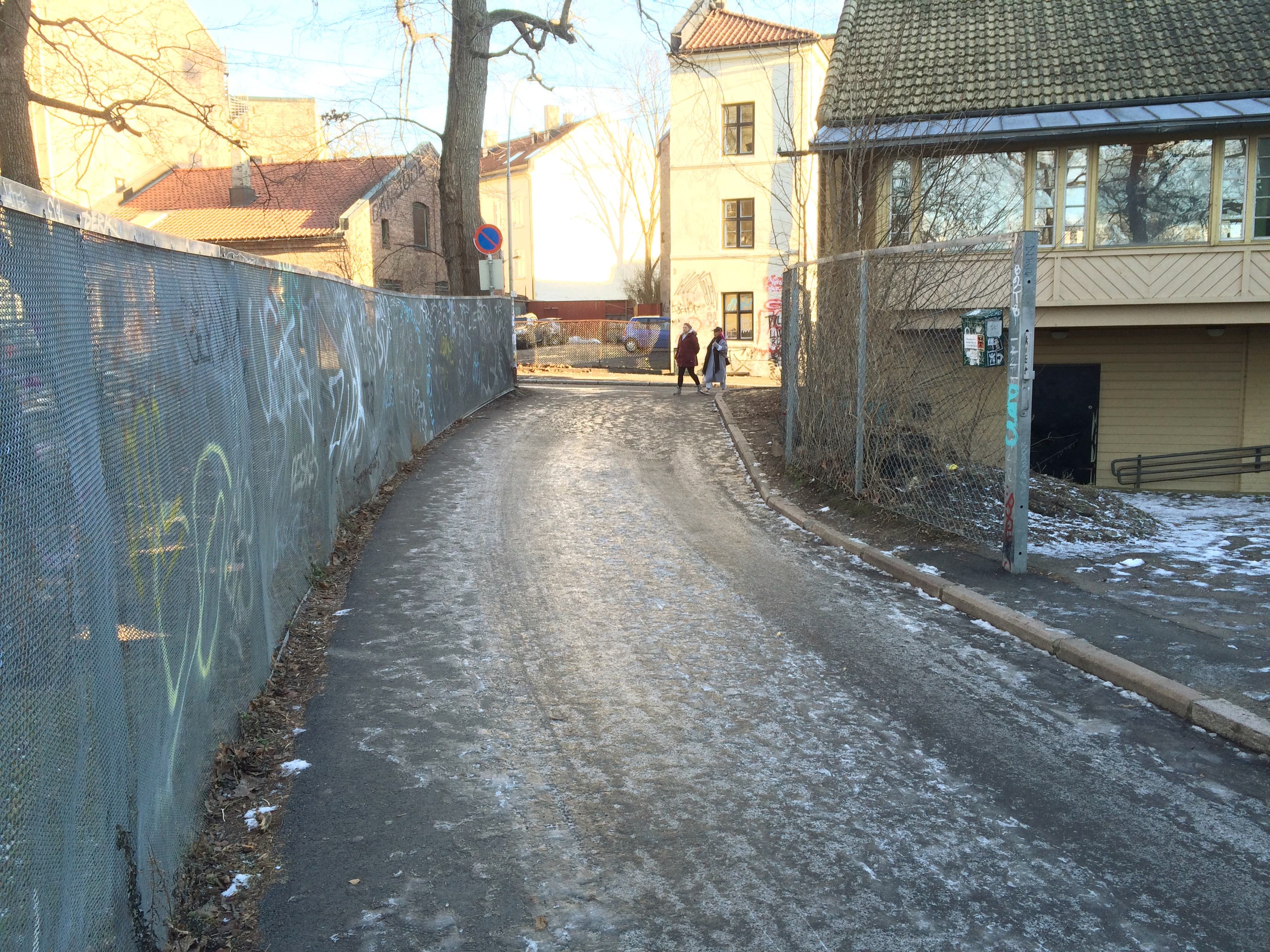 Rosings gate mot Akersveien